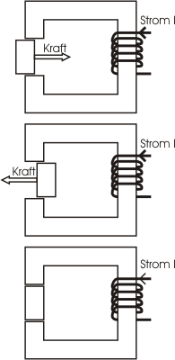 Kraft (in x-Richtung) auf einen Eisenkern im Luftspalt: Eine Spule ist um einen feststehenden Eisenkern gewickelt. Im Luftspalt befindet sich ein zweiter nach links und rechts beweglicher Kern. Erstes und zweites Bild: Es wirkt eine Kraft auf den Kern. Drittes Bild: Der Kern ist genau in der Mitte und es wirkt keine Kraft mehr. Siehe Reluktanzkraft